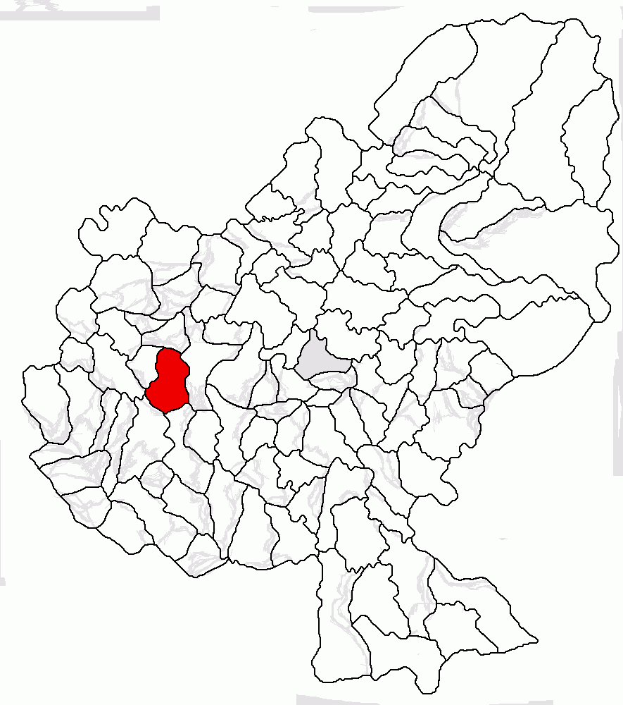 Categorie:Hărţi ale judeţului Mureş